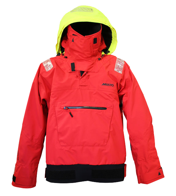 Exemple de Veste de Quart